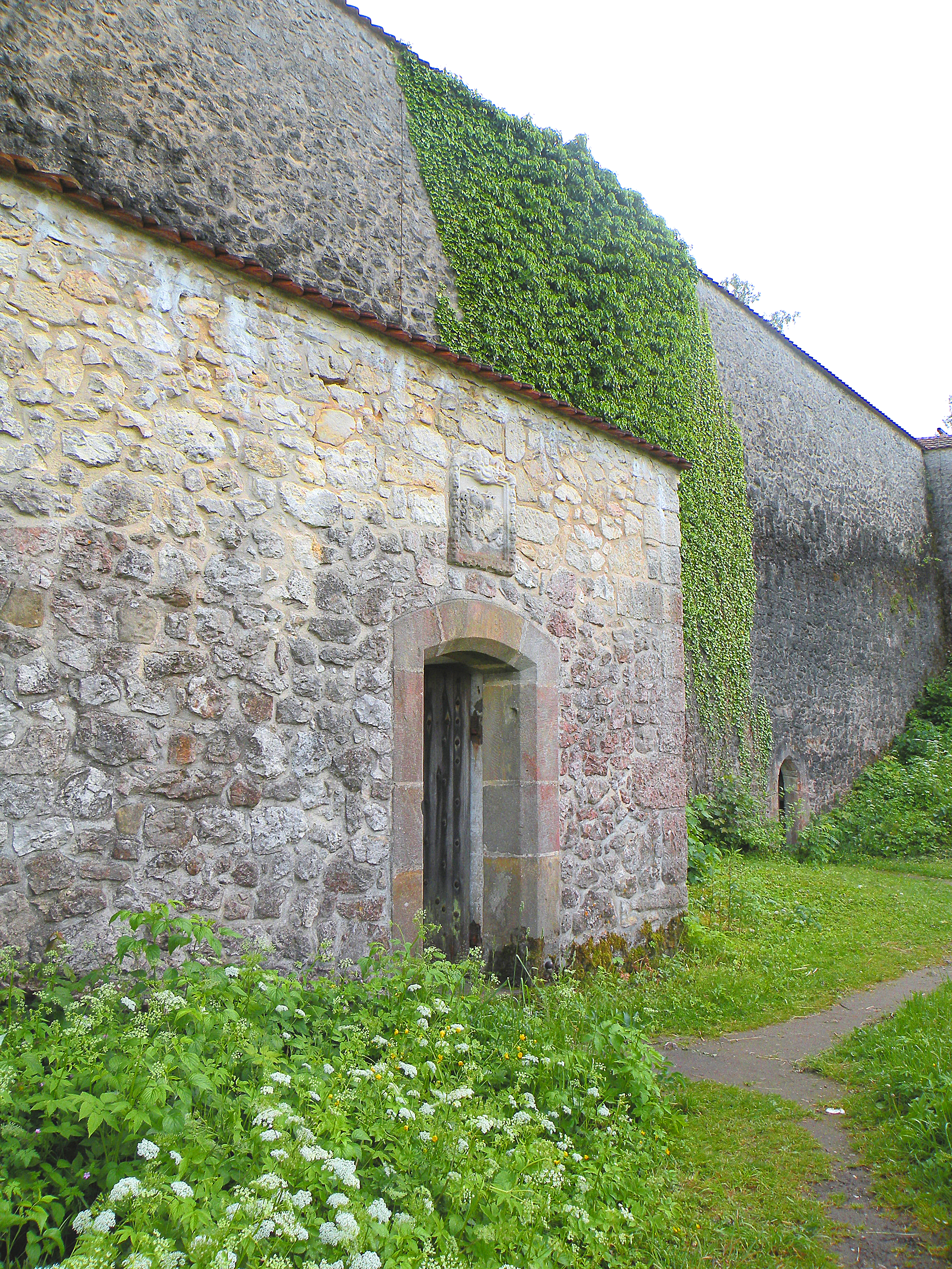 Замок Фельденштайн.Вход в бункер Геринга.